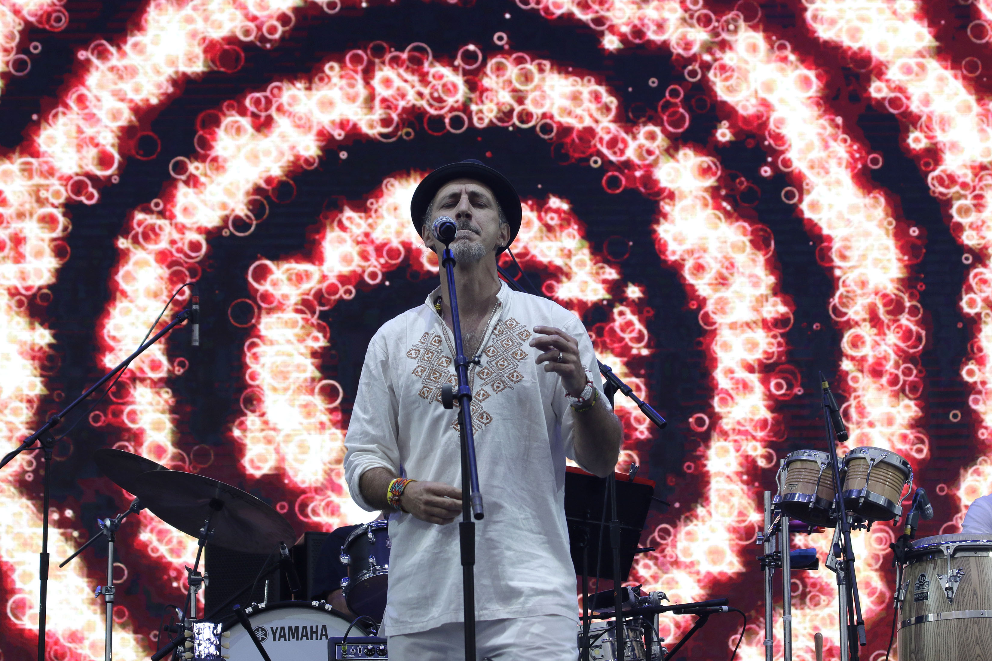 Sábado 27 de abril de 2019 Como parte de las actividades de Tierra Beat, Fiesta Internacional de Música y Acción Ambiental, en el Parque Bicentenario, se realizó en el escenario principal el concierto de reggae con la banda Sargento García. Fotografía: Tania Victoria/ Secretaría de Cultura de la Ciudad de México